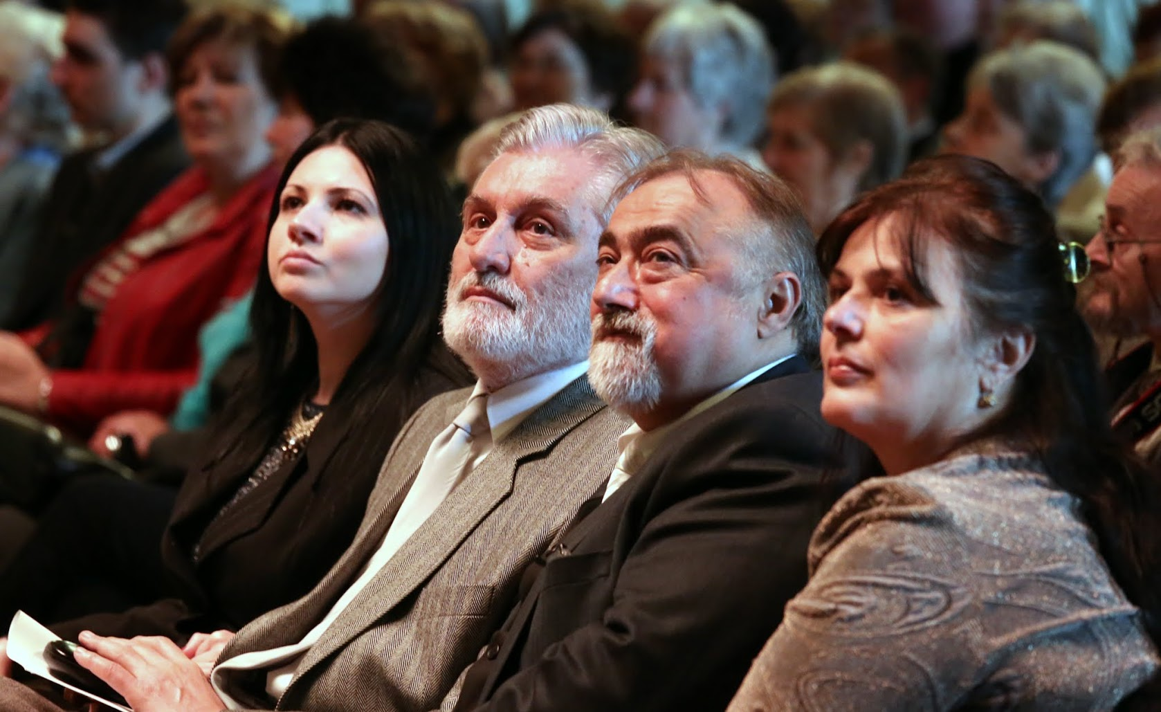 Raffay Ernő, Magyar Örökség díj átadón, 2014